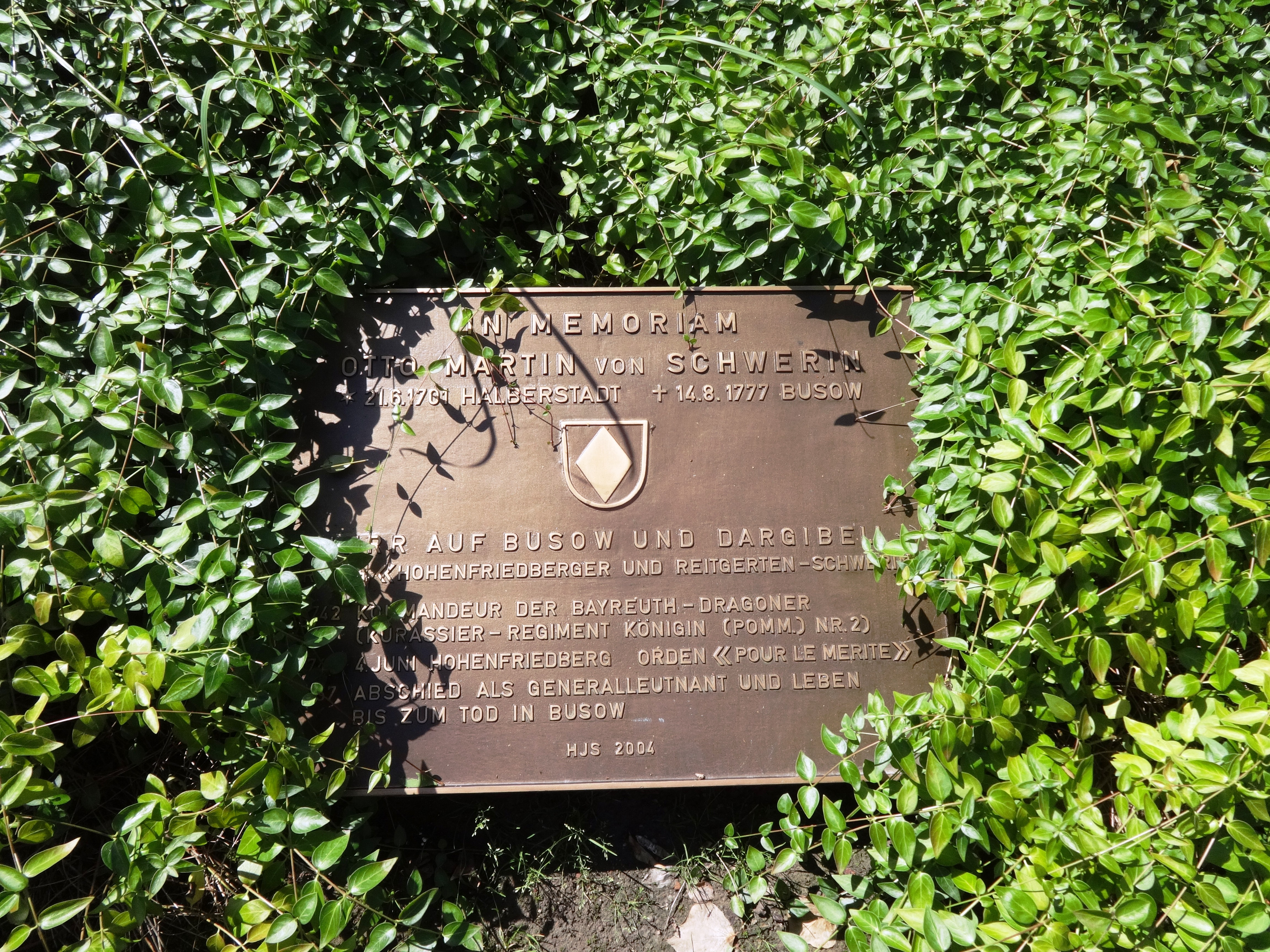 Die Kapelle Busow der Gemeinde Ducherow wurde im 15. Jahrhundert aus Feldsteinen errichtet und anschließend verputzt. Im Innenraum steht unter anderem ein Kanzelaltar aus dem Ende des 18. Jahrhunderts.